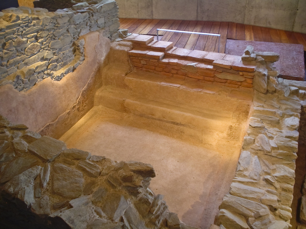 Balneum de la Villa romana de Cambre - GaliciaGalego: Balneum da Vila romana de Cambre - Galicia